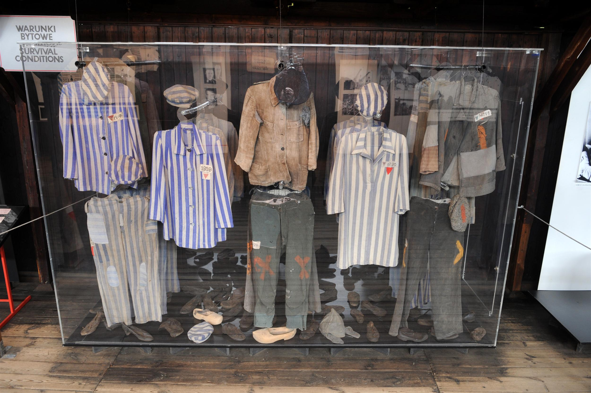 Fragmenty wystawy w jednym z baraków w KL Majdanek